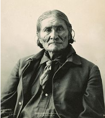 Chiricahua Apache 리더 Geronimo 사진 촬영 프랭크 A. Rinehart , 1898.